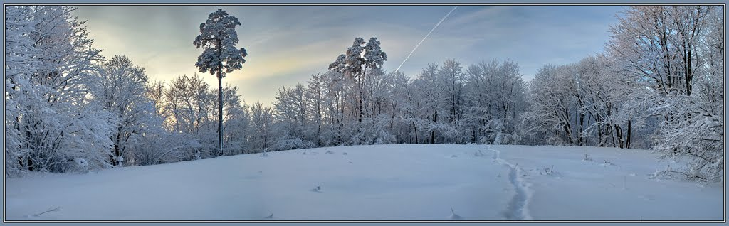 Нагорный парк: Дудергофские высоты, Можайский, Красносельский район, Санкт-Петербург.